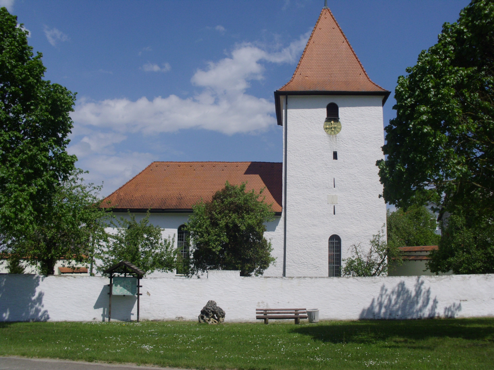 Rehlingen, Ortsteil von Langenaltheim im mittelfränkischen Landkreis Weißenburg-Gunzenhausen (Bayern), Evan.-Luth. Pfarrkirche